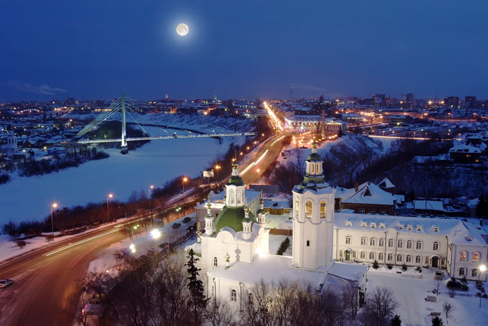 La Krestovozdviĵenskaja preĝejo (eo: Preĝejo honore al starigo de la Sankta Kruco), la Ponto de geamantoj kaj la Nikolskij-ponto. (Tjumeno, Rusio)